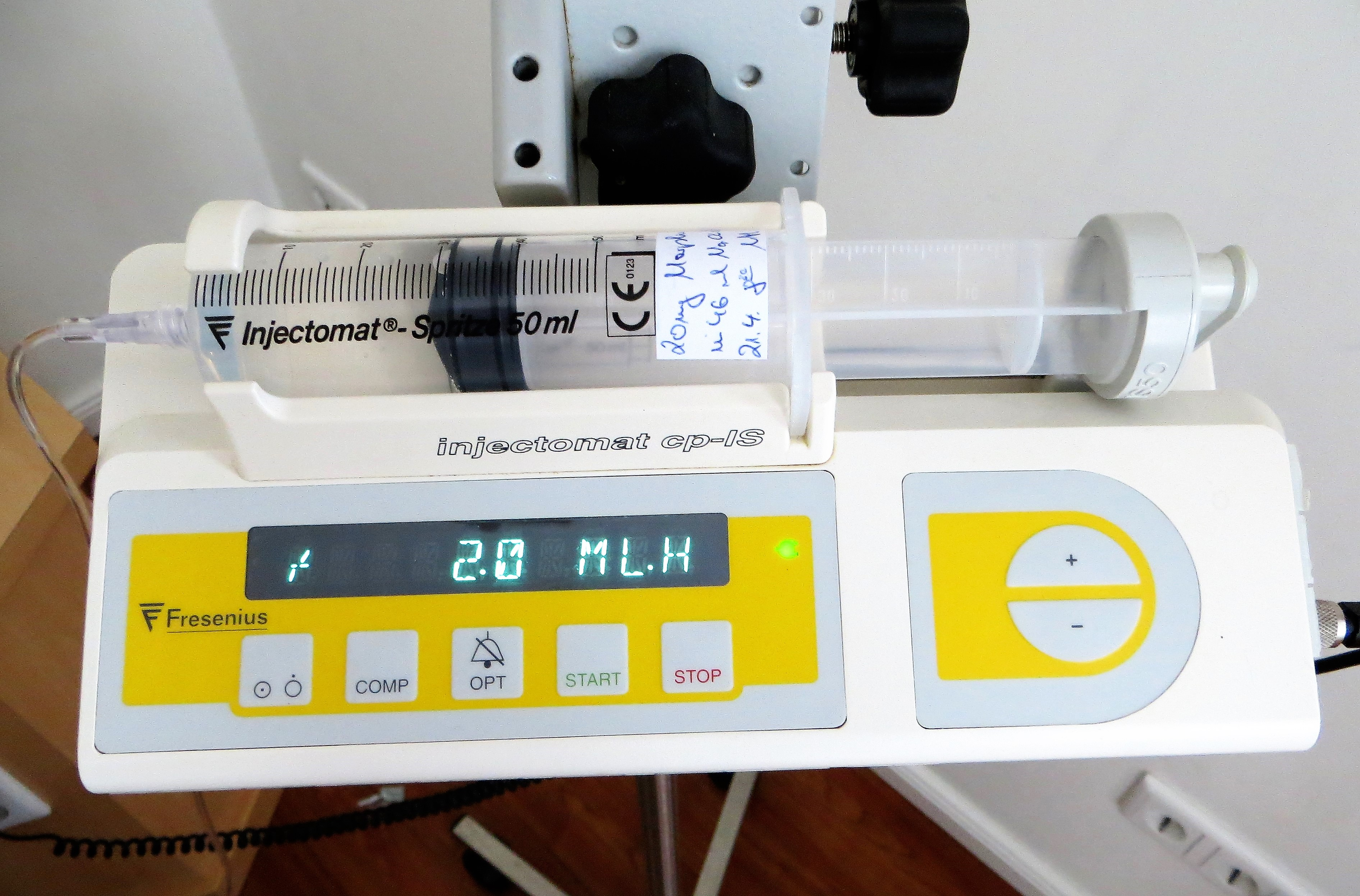 Medizintechnisches Gerät zur gesteuerten Abgabe von Infusionslösungen